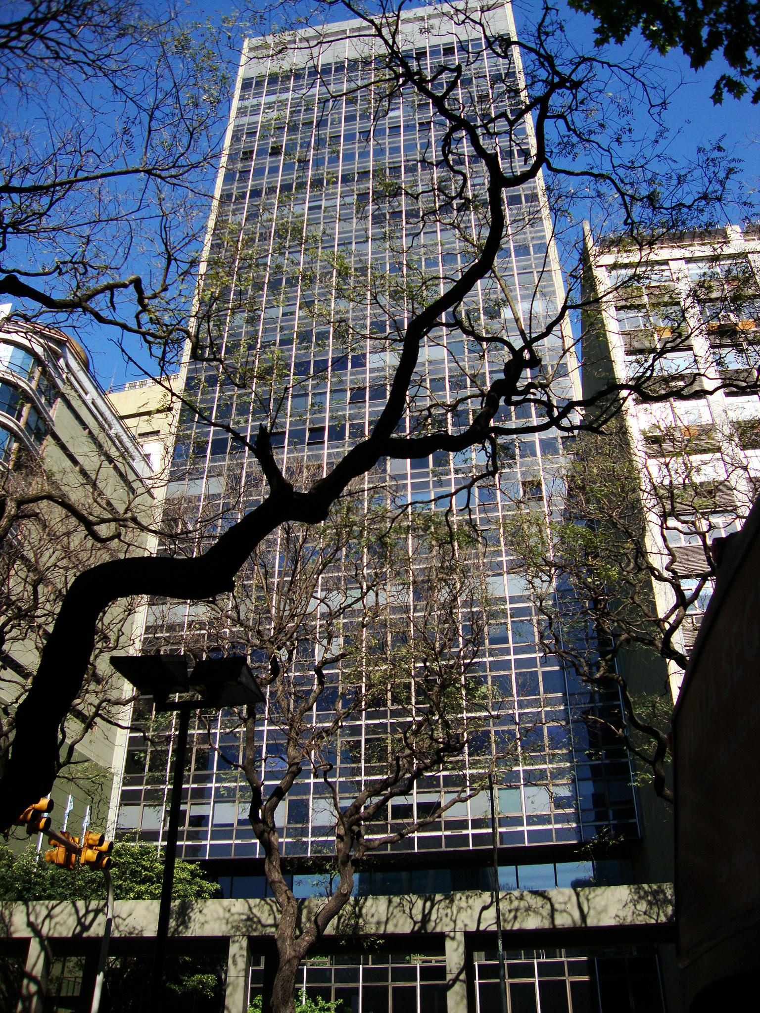 Edificio CHACOFI, propiedad original de la consttructora y desarrolladora CHACOFI, torre de 113 metros de altura construida entre 1974 y 1980. Arquitecto: Mario Roberto Álvarez y Asociados. Buenos Aires, Argentina.